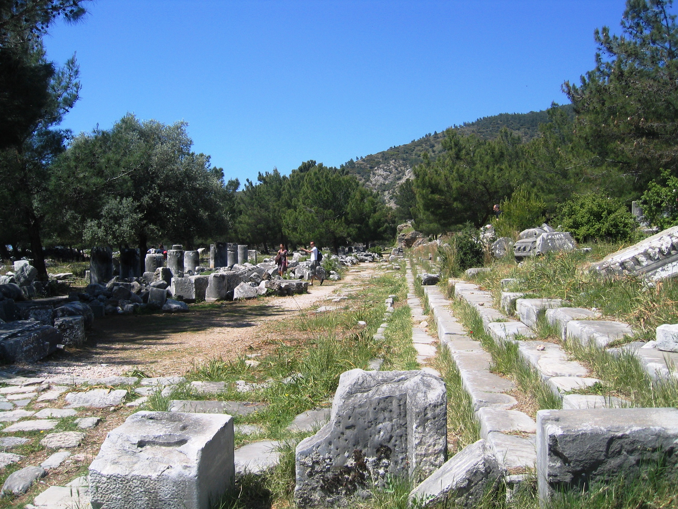 Turquie Priene Allee Principale